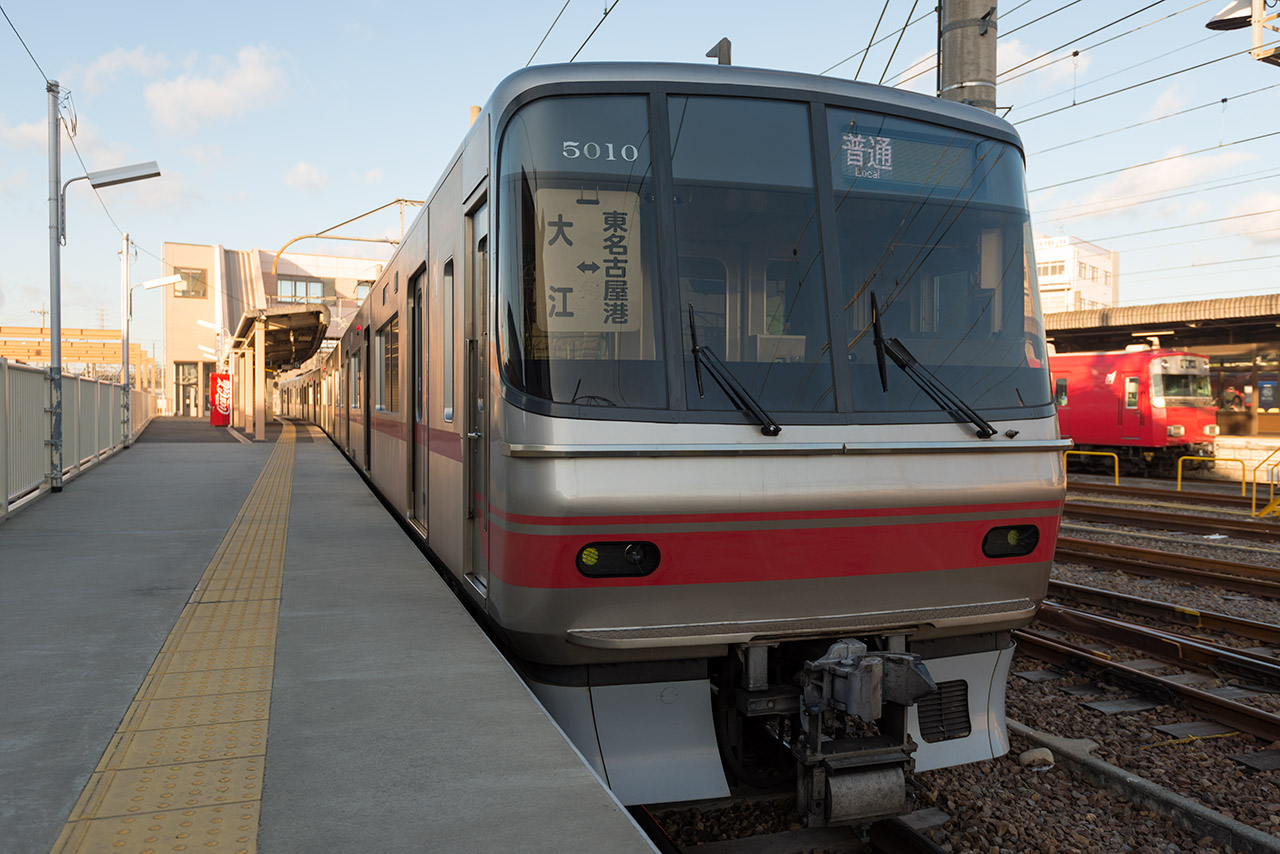 築港線車両の行先表示 大江駅にて